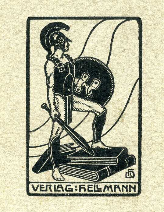 Signet des Verlags Hellmann, ca. 1900